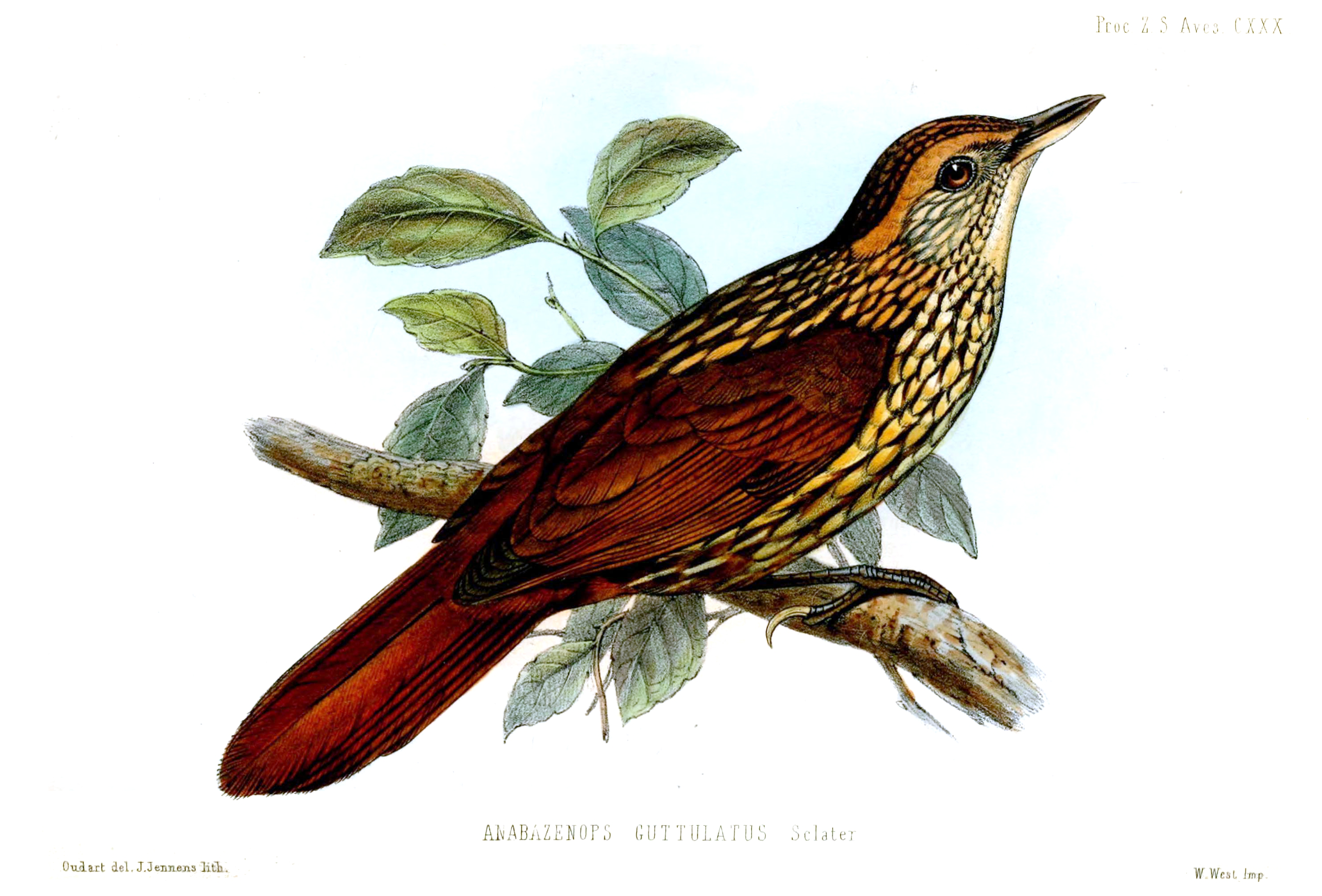 Anabazenops guttulatus=Syndactyla guttulata